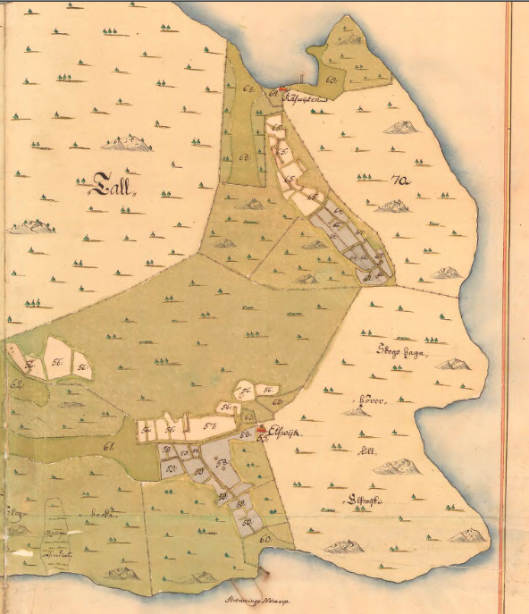 Karta över de separata lantbruksgårdarna Elfvik och Rävvik på Elfvikslandet, Lidingö, upprättad 1720 av lantmätare Lars Kietzlingh.